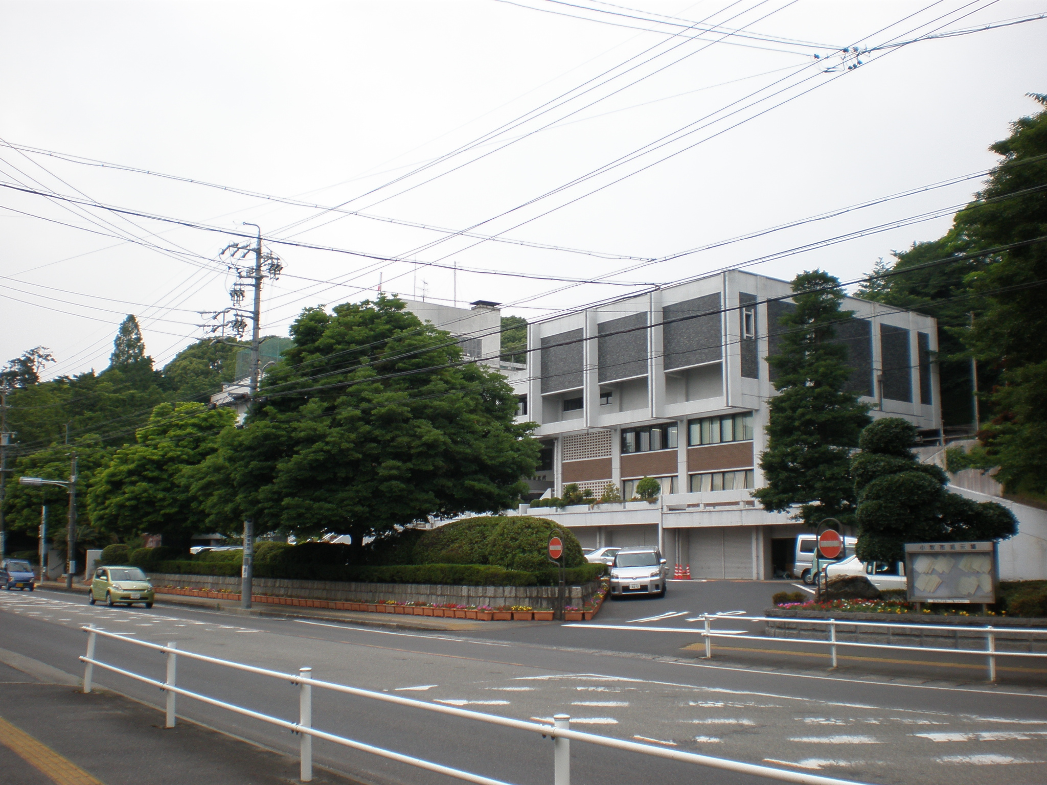 愛知県小牧市の小牧市役所北庁舎